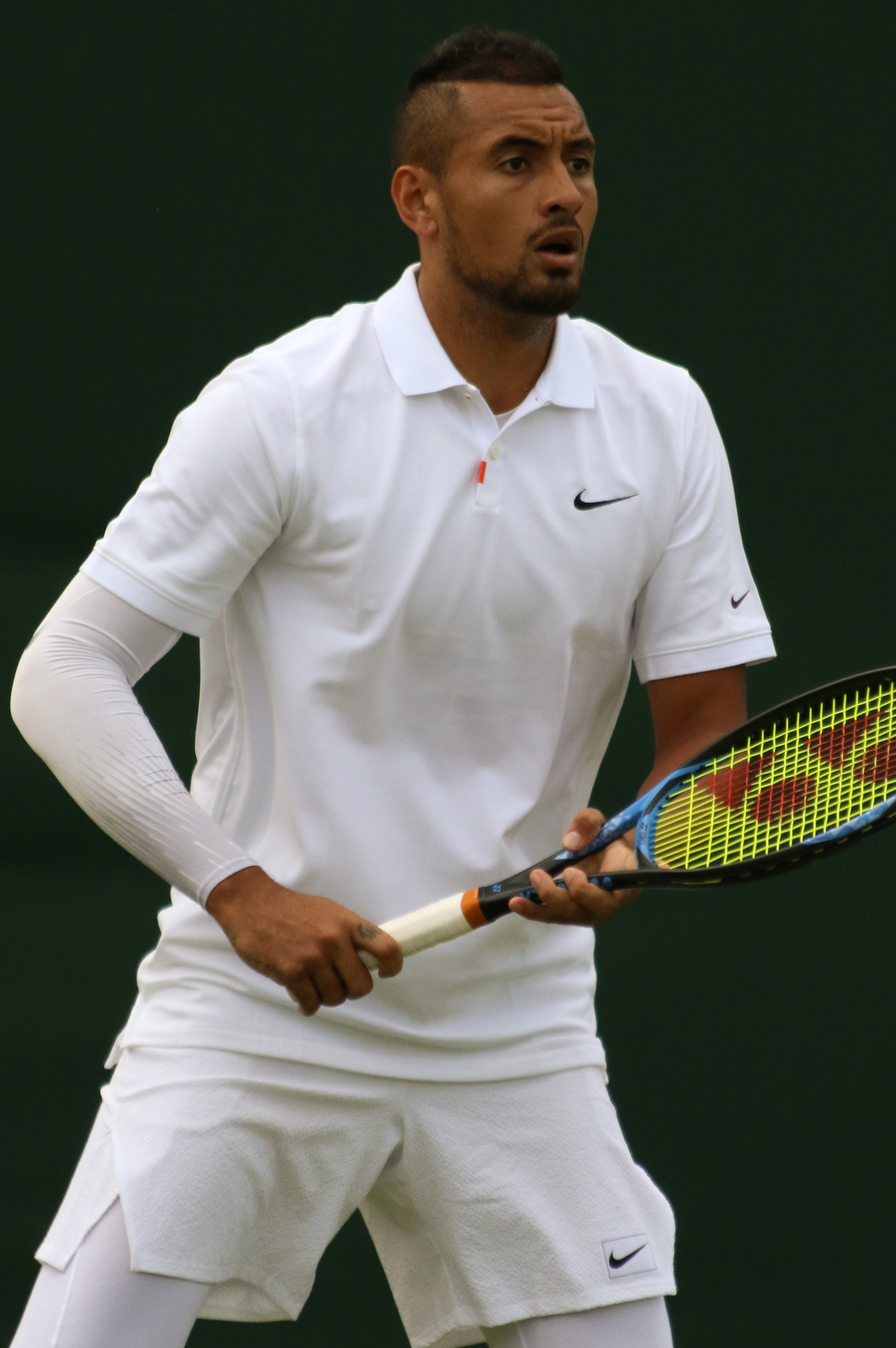 Kyrgios WM19 (75)